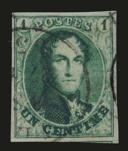 Timbre de Belgique, 1 c vert, Médaillon allongé, non-dentelé, émis le 1er juin 1861. Oblitéré en 1863. COB N°9.